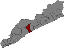 Localització de Sant Andreu de Llavaneres al Maresme